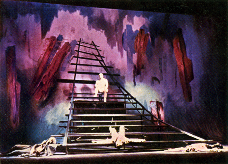 Nie-Boska Komedia Z. Krasińskiego, inscenizacja B. Korzeniewski, scenografia J. Szajna, Teatr Nowy Łodź 1959